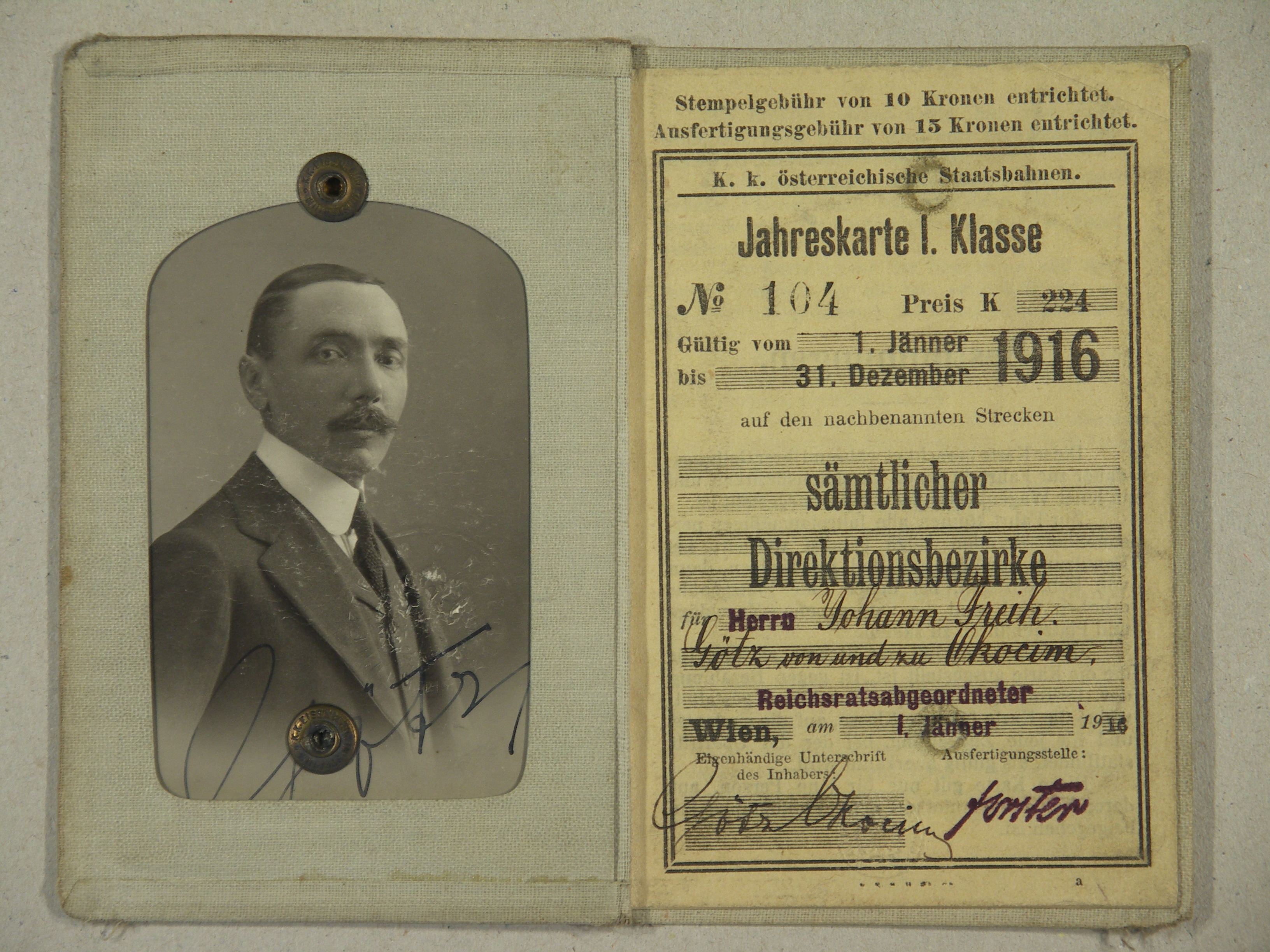 Legitymacja uprawniająca Jana Albina Götza Okocimskiego, posła do parlamentu wiedeńskiego (Reichsratabgeordneter), do przejazdów koleją w cenie 224 koron na rok 1916, za wyjątkiem pociągów ekspresowych i klasy luks, wydana przez c.k. ministerstwo kolei. Jan Götz Okocimski (1864-1931), syna Jana, założyciela browaru w Okocimiu, był znanym przemysłowcem, zaangażowanym także w działalność samorządową i polityczną. W latach 1892-1918 był posłem do Rady Państwa, a w latach 1901-1918 także posłem na Sejm Galicyjski. Od 31 V 1917 do 1 II 1918 pełnił funkcję przewodniczącego Koła Polskiego w Wiedniu. Pod jego przewodnictwem odbyło się 16 II 1918 r. historyczne posiedzenie 68 posłów polskich, na którym wniesiono deklarację potępiającą stanowisko Austrii w sprawie ziemi chełmskiej, ustalone podczas negocjacji w Brześciu Litewskim. Koło Polskie przeszło wówczas do opozycji wobec rządu. W odrodzonej Rzeczypospolitej zasiadał w sejmie (1919-1921) oraz w senacie (1928-1930). Miejsce: Wiedeń Opis: oryginał; jęz. niemiecki; papier + fotografia; oprawa płócienna; 90x125 mm; sucha pieczęć c.k. ministerstwa kolei wyciśnięta na fotografii; podpisy Jana Götza na dokumencie i fotografii; 12 stron + oprawa (ostatnia strona doklejona do oprawy); adnotacje Jana Götza o datach i trasach odbytych podróży Autor komentarza: Aleksander Korolewicz Autor fotografii: Wiesław Filipczyk